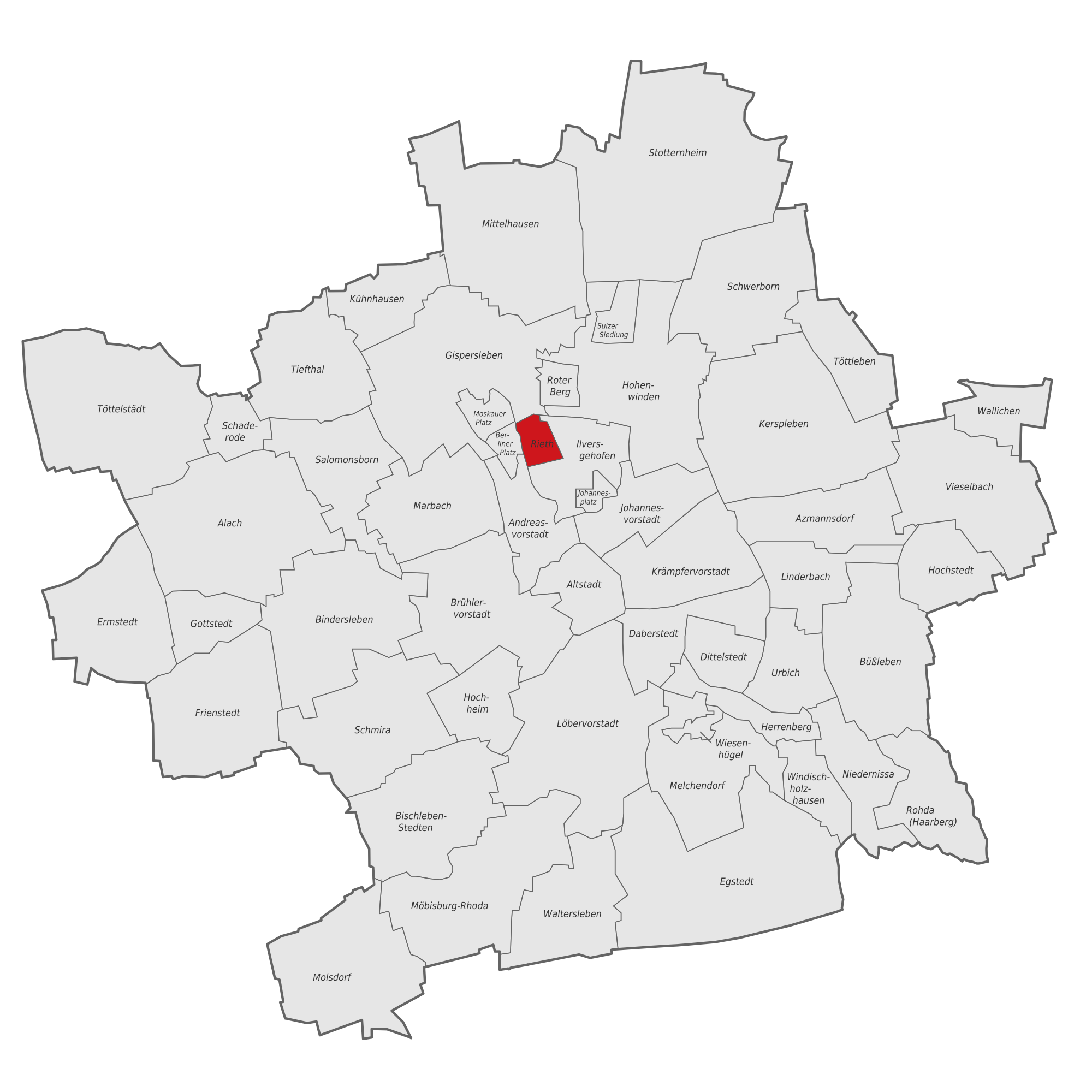 Karte des Stadtgebietes von Erfurt mit Hervorhebung des Ortsteiles Rieth